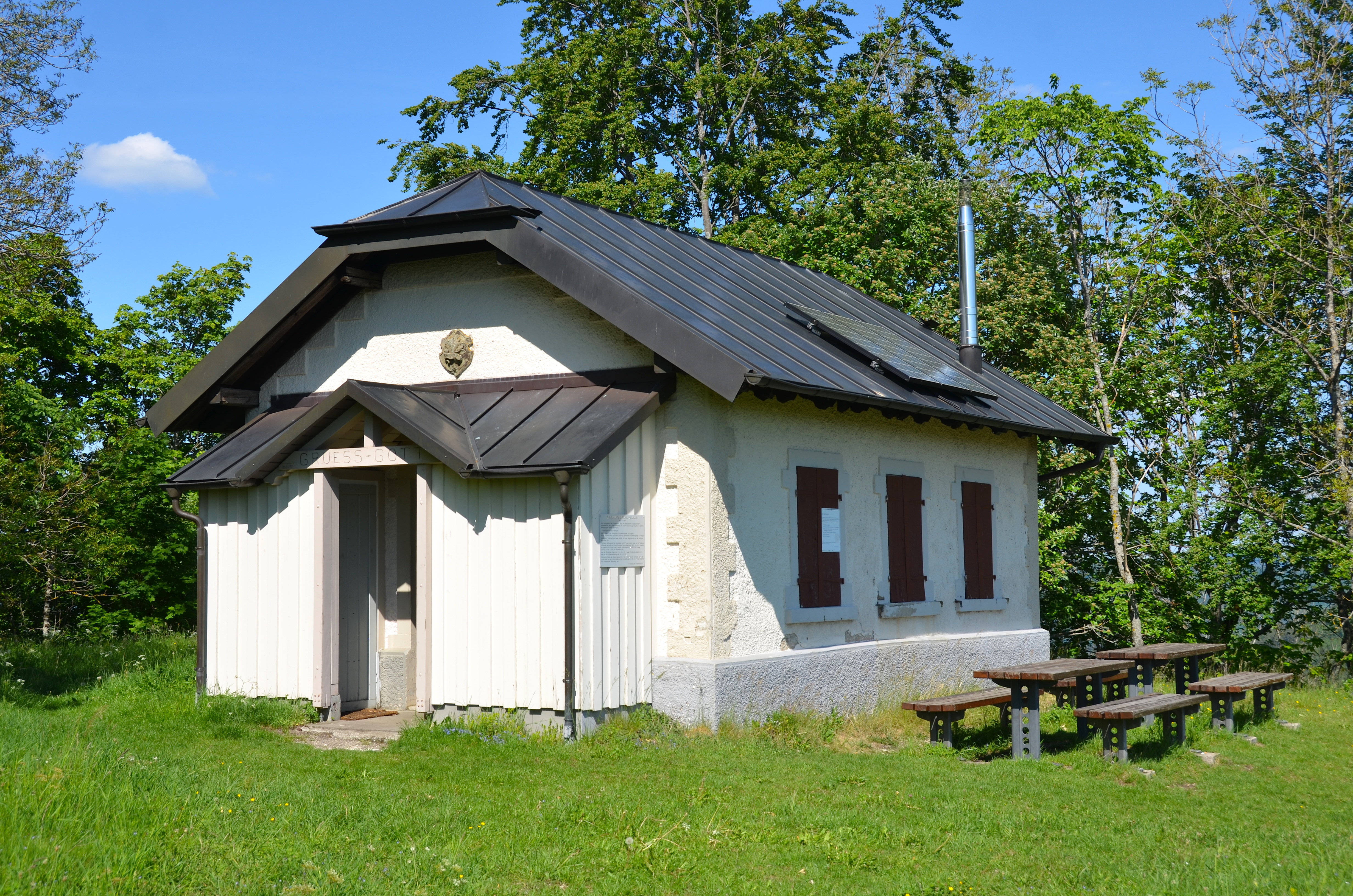 Lochenhütte des Schwäbischen Albvereins auf der Lochen (Schwäbische Alb)